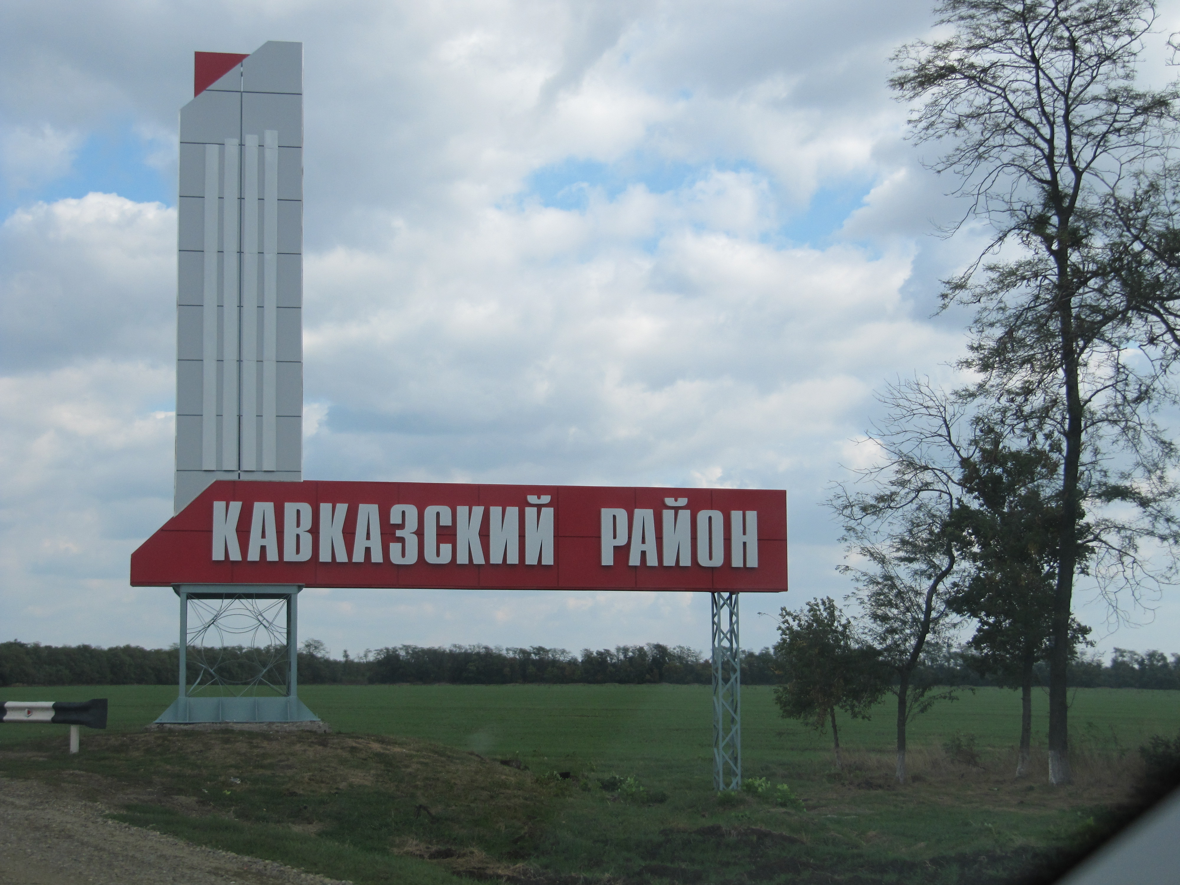 Кавказский район, Краснодарский край